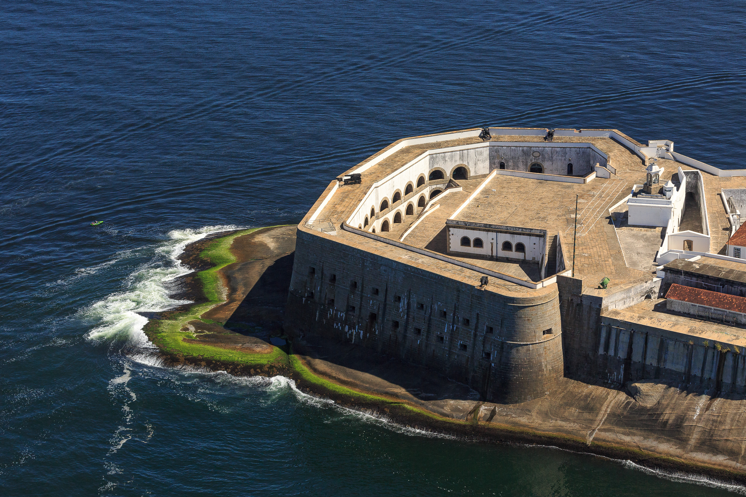 Vista aérea da Fortaleza de Santa Cruz da Barra na cidade de Niterói